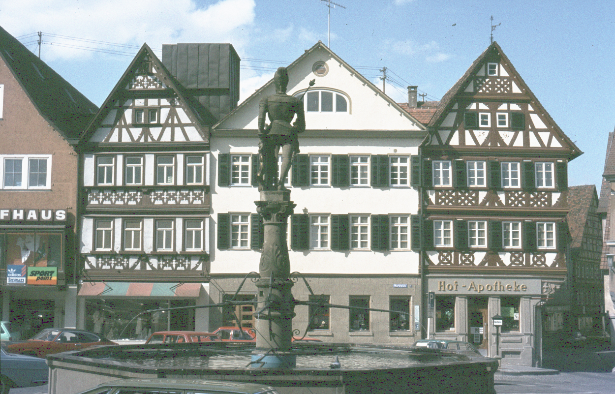 Brunnen und Fachwerkhäuser am Marktplatz Fotograf: Richard Schubert